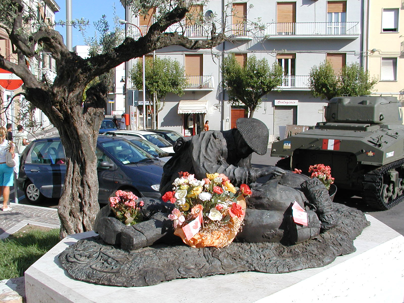 Das Denkmal in der Stadt für die gefallenen kanadischen Soldaten